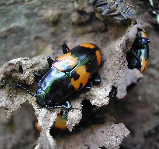 Megalodacne heros